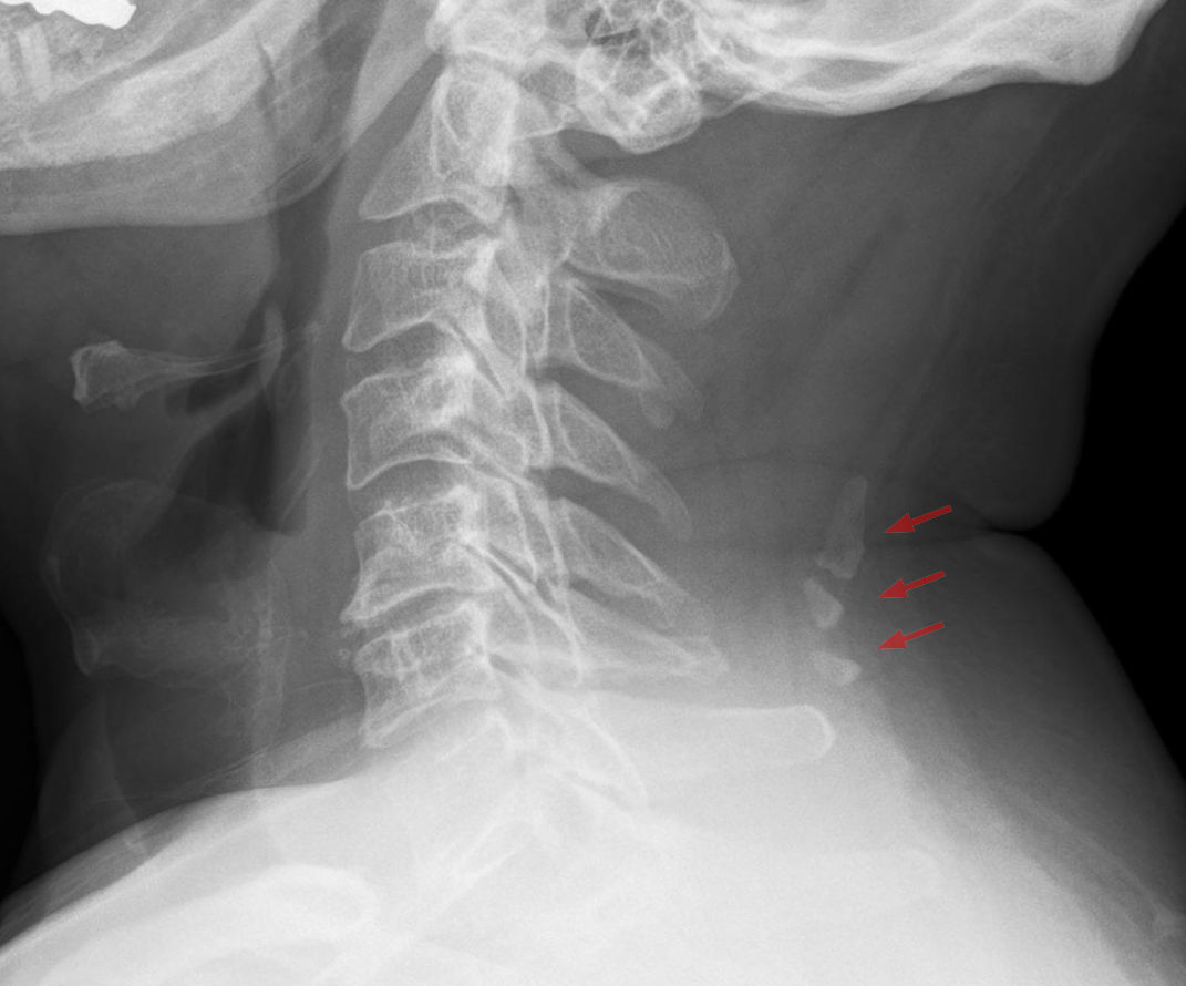 Verkalkungen / Ossifikationen im Ligamentum nuchae, hier Zufallsbefund. Differentialdiagnostisch muss eine "Schipperfraktur" also eine Abscherung der Dornfortsätze am zervikothorakalen Übergang unterschieden werden.